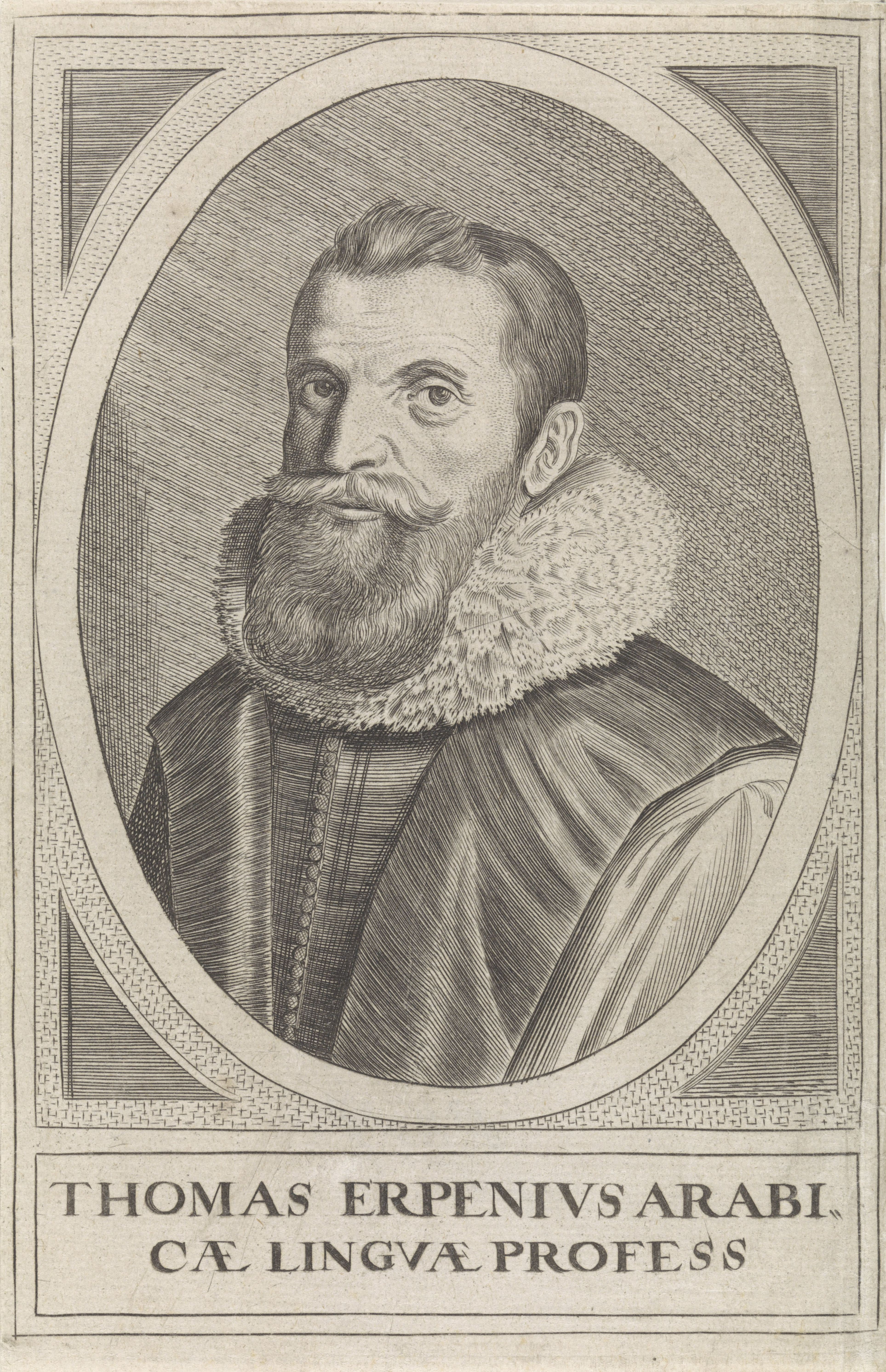 IdentificatieTitel(s): Portret van Thomas ErpeniusObjecttype: prent Objectnummer: RP-P-1906-1568Catalogusreferentie: Franken&van der Kellen 17Opschriften / Merken: verzamelaarsmerk, verso, gestempeld: Lugt 2228Omschrijving: Portret van Thomas Erpenius, professor te Leiden.VervaardigingVervaardiger: prentmaker: de Passe (atelier van)prentmaker: Jan van de Velde (II) (verworpen toeschrijving)Datering: 1625Fysieke kenmerken: gravureMateriaal: papier Techniek: graveren (drukprocedé)Afmetingen: plaatrand: h 154 mm × b 100 mmToelichtingBoekillustratie in: Meursius, Joannes. Athenæ Batavæ. Sive, De vrbe Leidensi, & academiâ, virisque claris. Leiden: Andries Clouck, Bonaventura en Abraham Elzevier, 1625.OnderwerpWie: Thomas ErpeniusVerwerving en rechtenVerwerving: aankoop 1906Copyright: Publiek domein